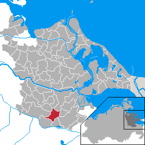 Sarnow, Landkreis Ostvorpommern, Mecklenburg-Vorpommern